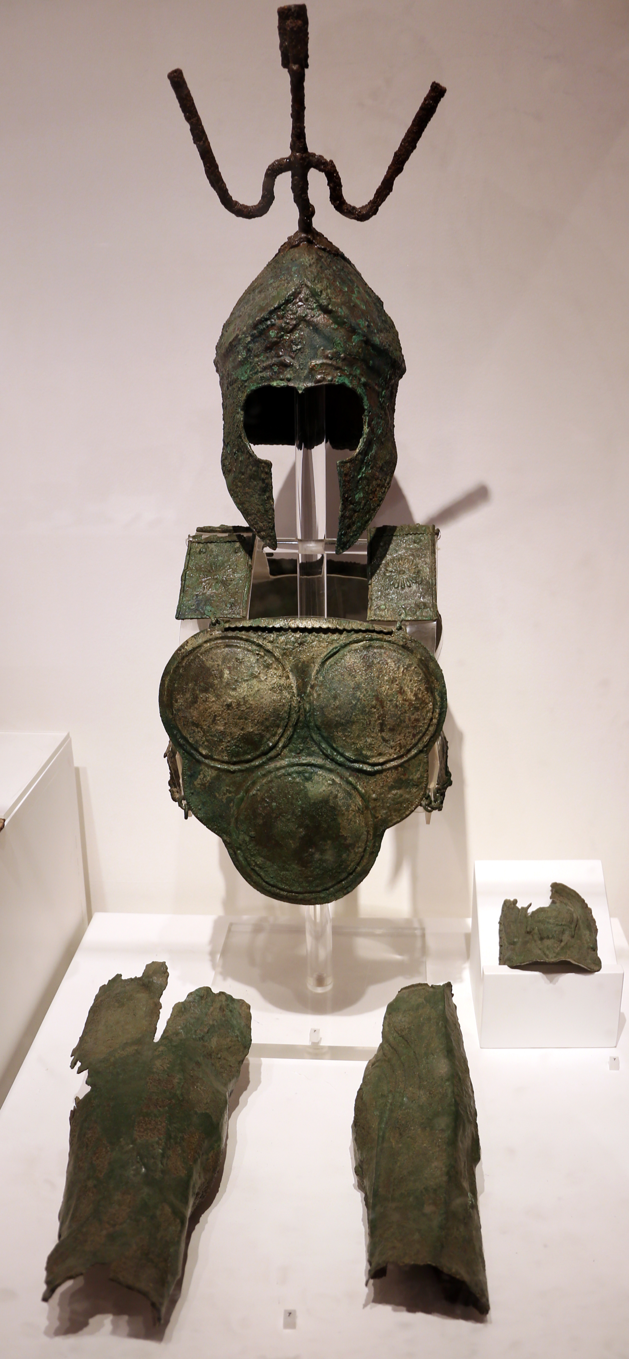 Palestra Grande This is a photo of a monument which is part of cultural heritage of Italy.